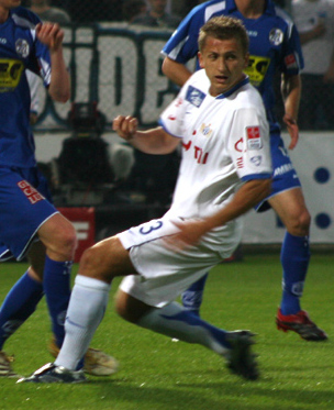 Almen Abdi, FCZ, Hardturm Stadion (Schweiz), Pokal Halbfinale, FC Zürich - FC Luzern 2:3